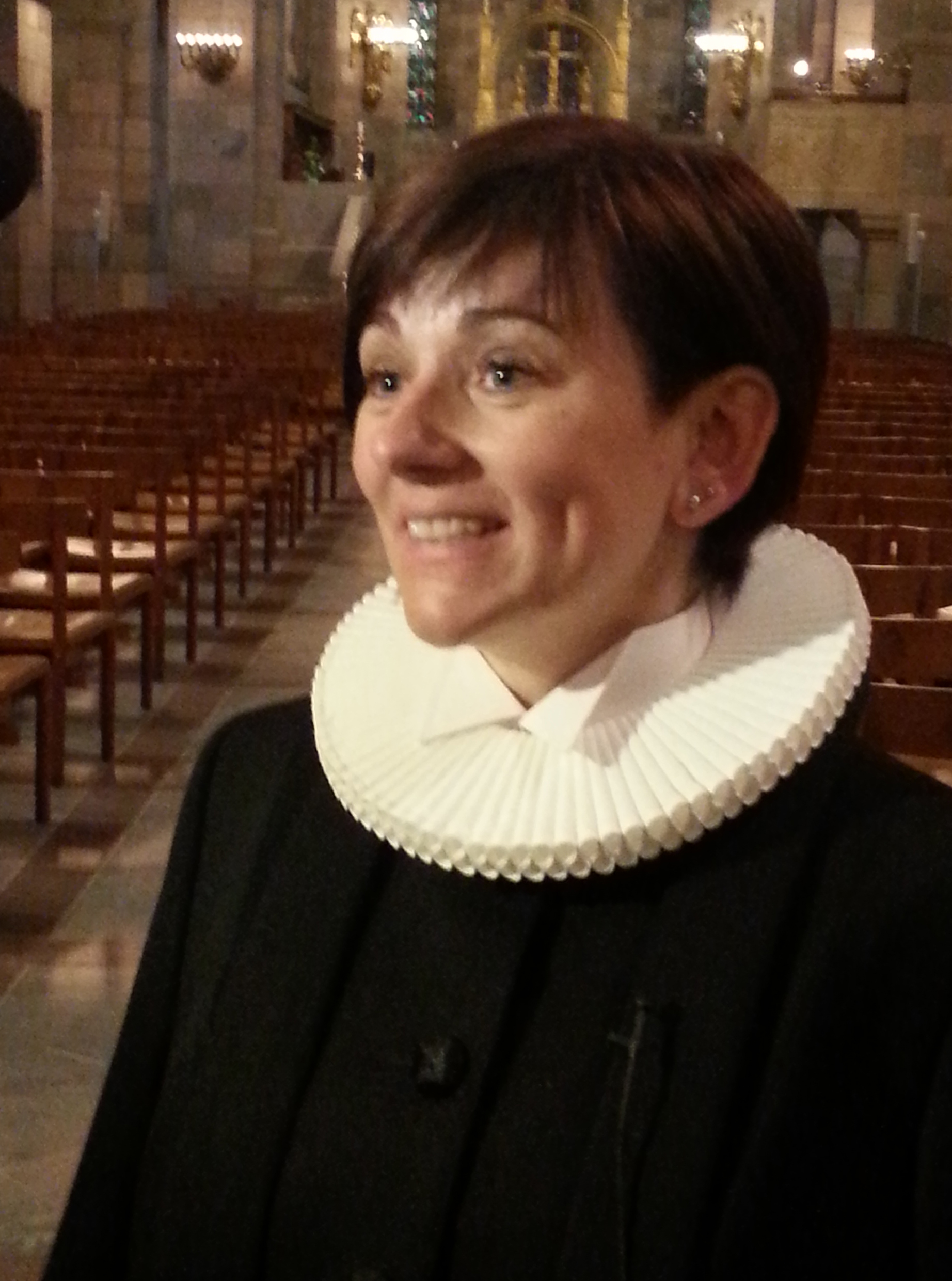 Pernille Vigsø Bagge i Viborg domkirke, 22. maj 2015, efter at være blevet indsat som præst i Løgstør, Aggersund, Kornum, Løgsted pastoret.